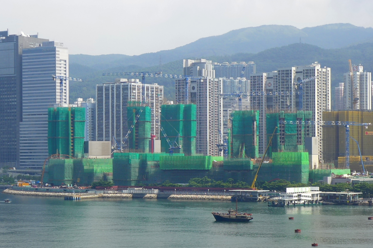 Tsuen Wan West TW5 Bayside Development